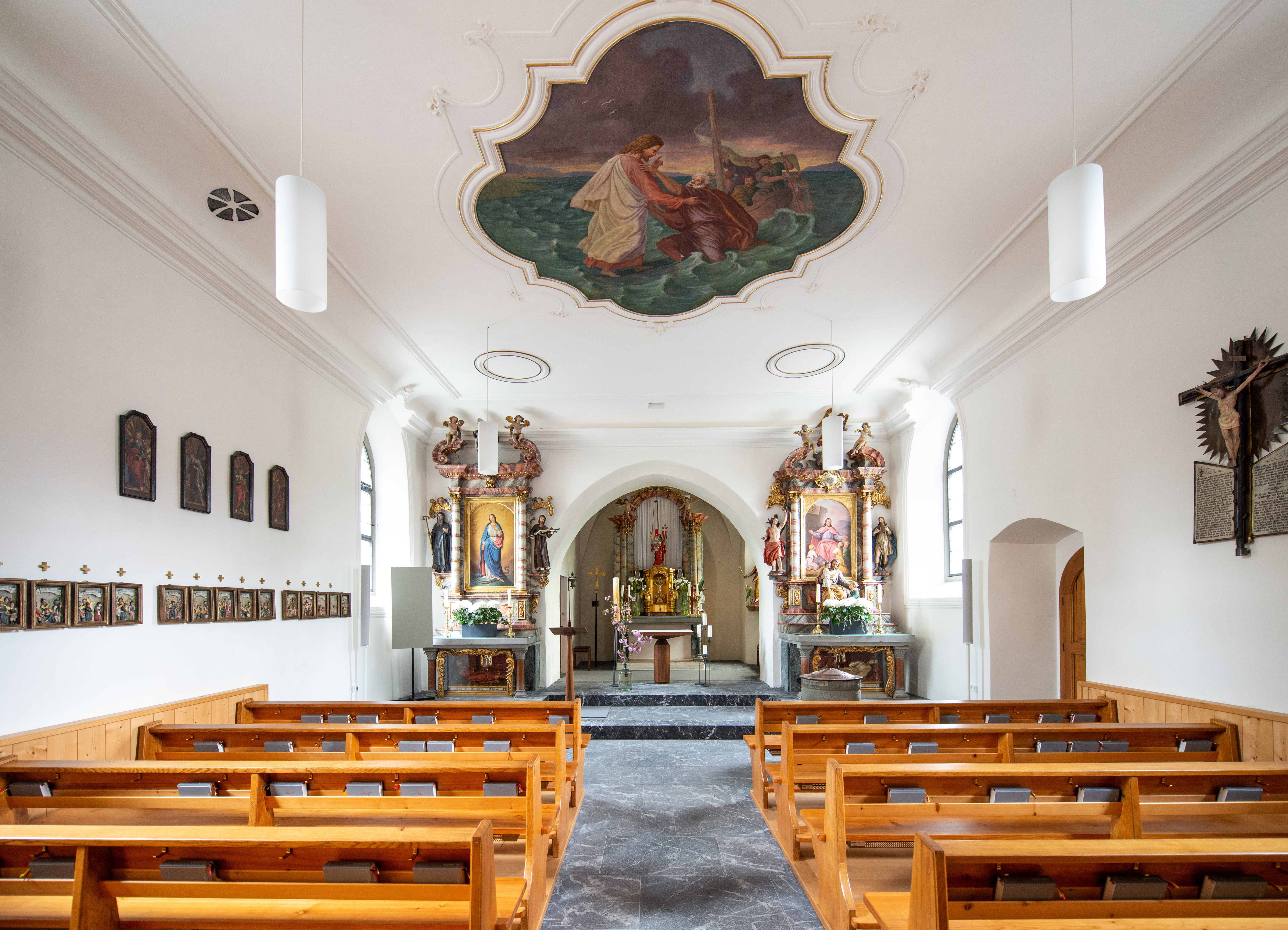 St. Peterskirche in Rankweil.